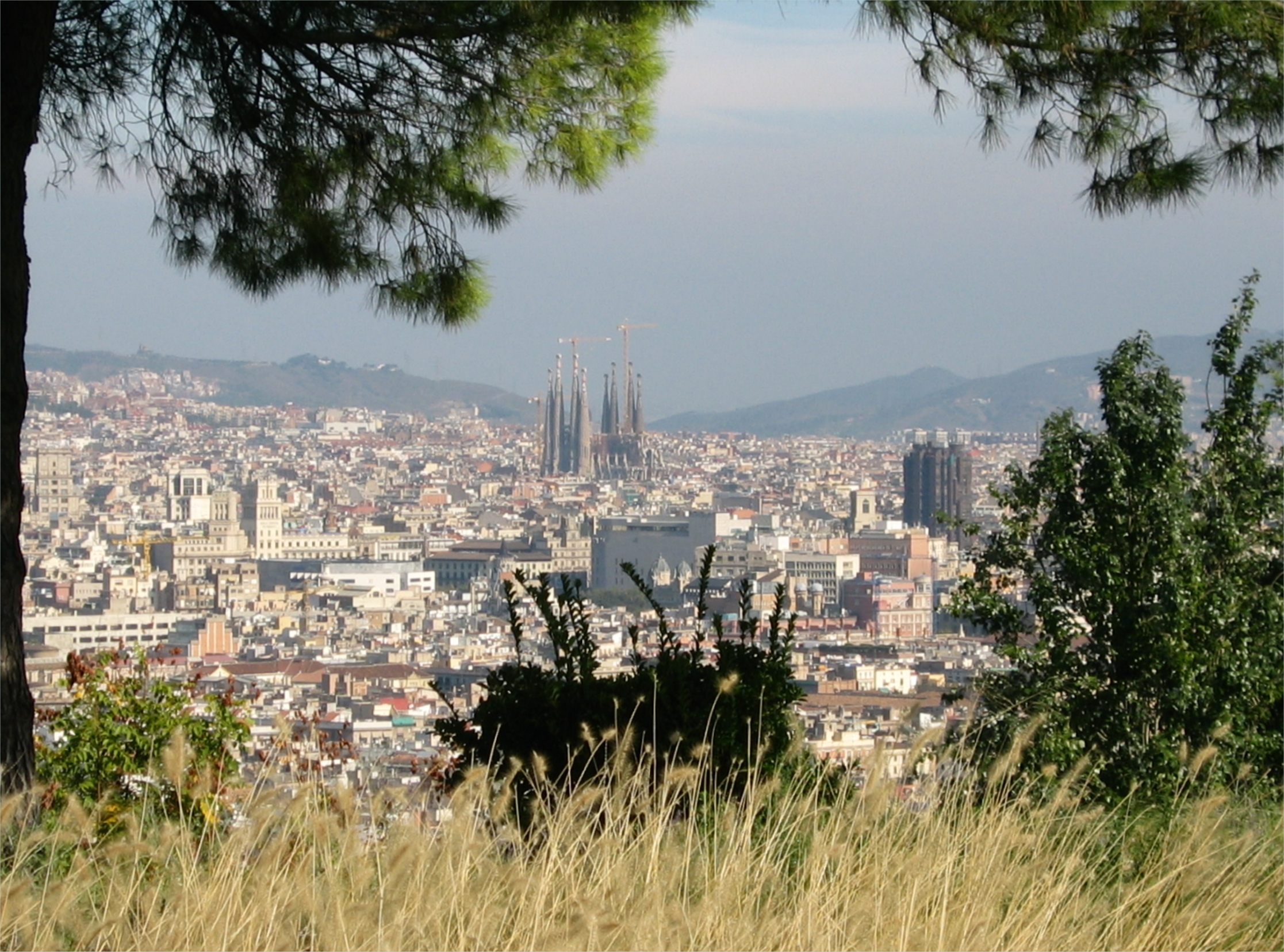 Barcelona